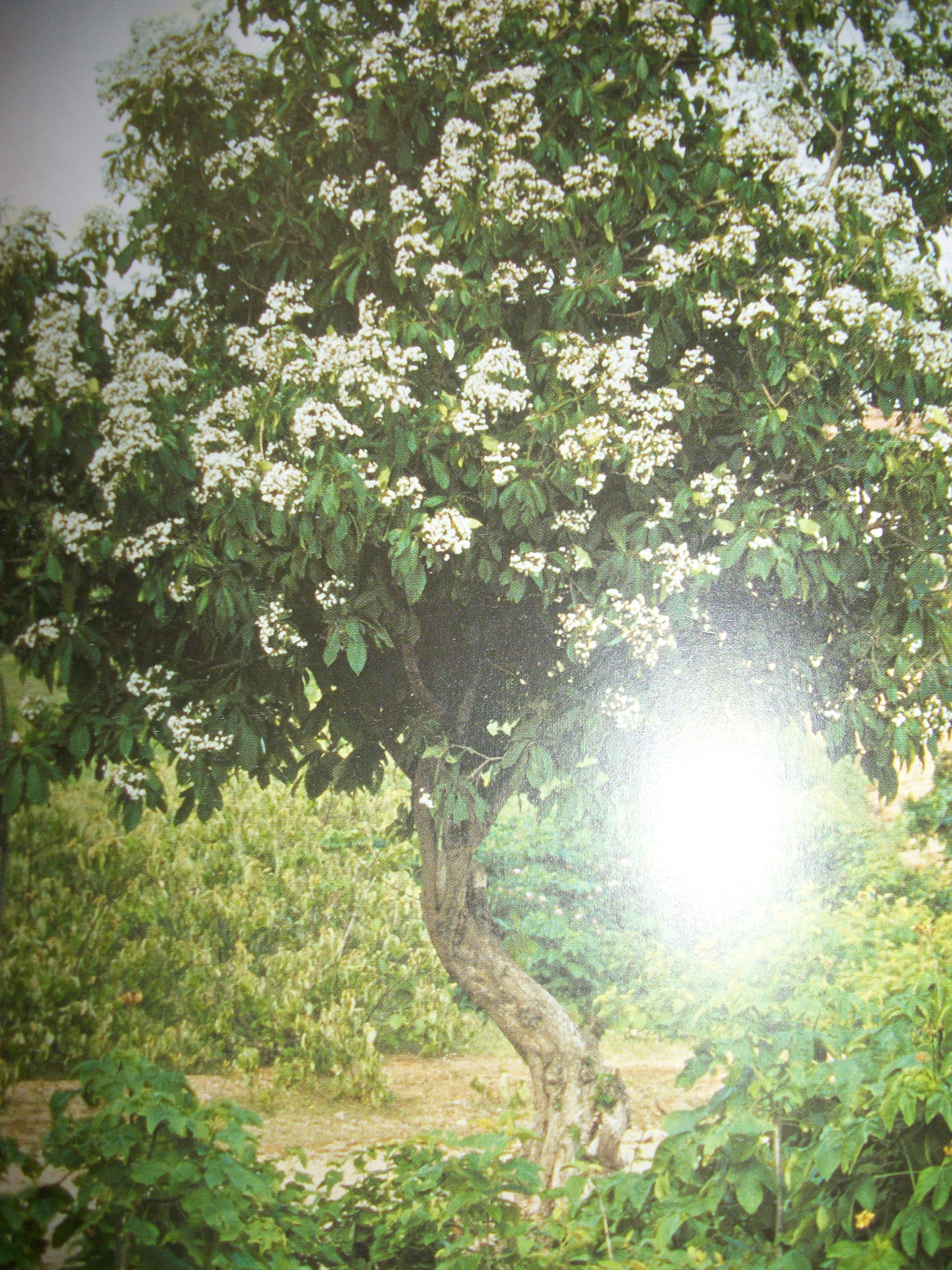 Pau-branco, árvore da caatinga cearense e potiguar